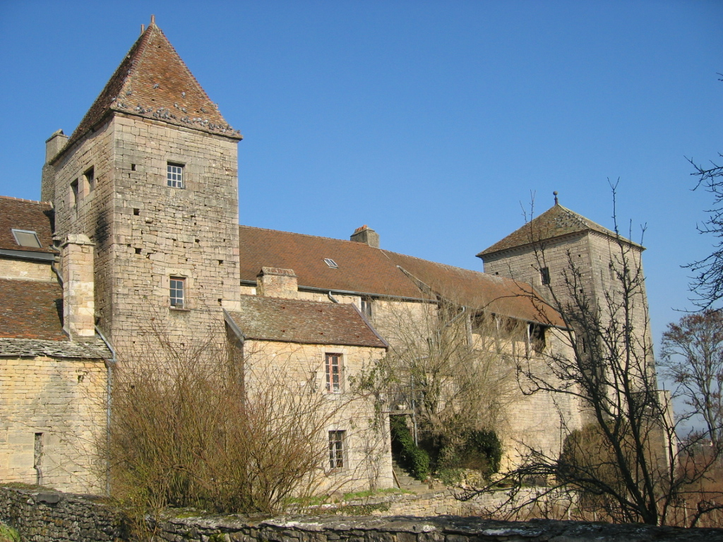 Château de Gevrey Chambertin, Côte-d'Or, Bourgogne